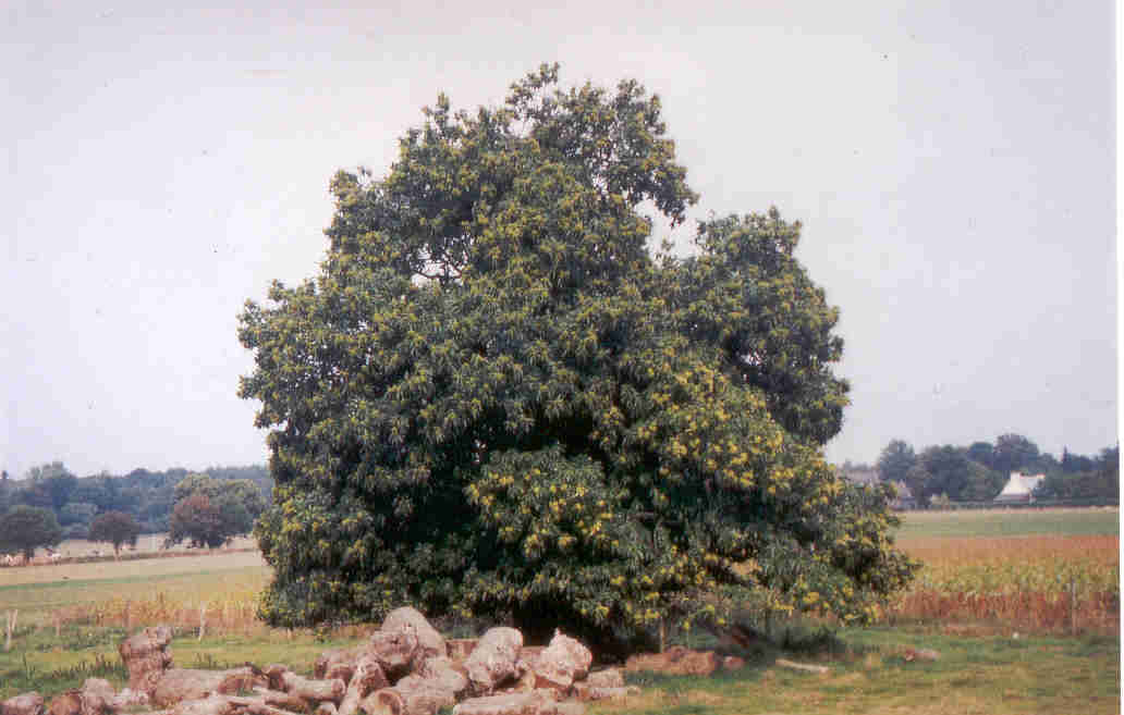 Un chataignier